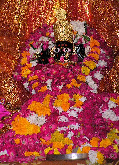 Photo of Kalika Mata